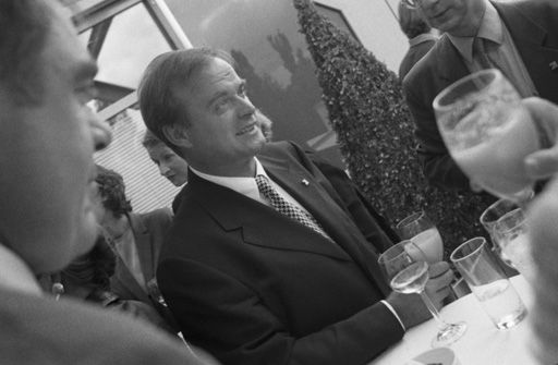 Georg Kofler am 7. Juli 1998 auf der Dachterrasse des Verwaltungsgebäudes der ProSieben Media AG in der Medienallee 7 in Unterföhring